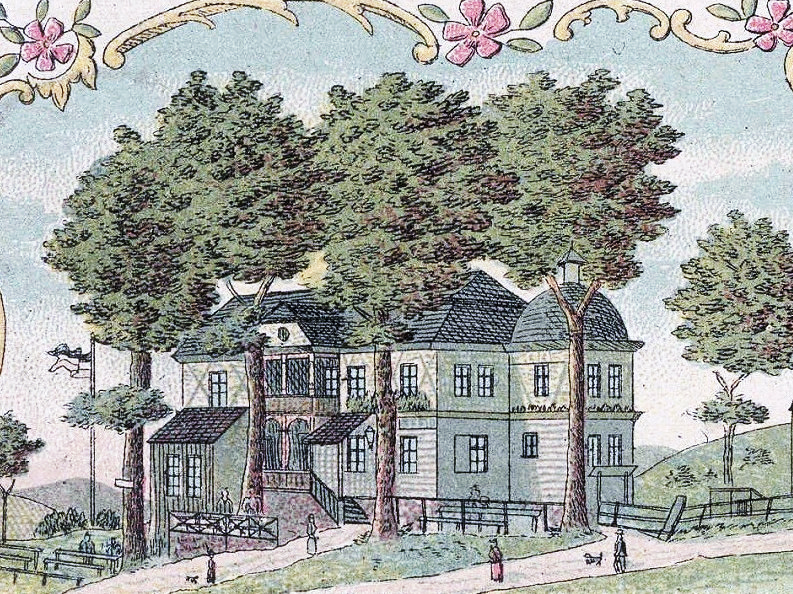 Były dom i restauracja, który należał do dusznickiego Bractwa Strzeleckiego. Budynek został spalony w 1913r. Konstrukcja po pożarze została odbudowana. W późniejszym czasie dom był kilkakrotnie przebudowywany. Obiekt zlokalizowany jest w granicach wsi Dolina.